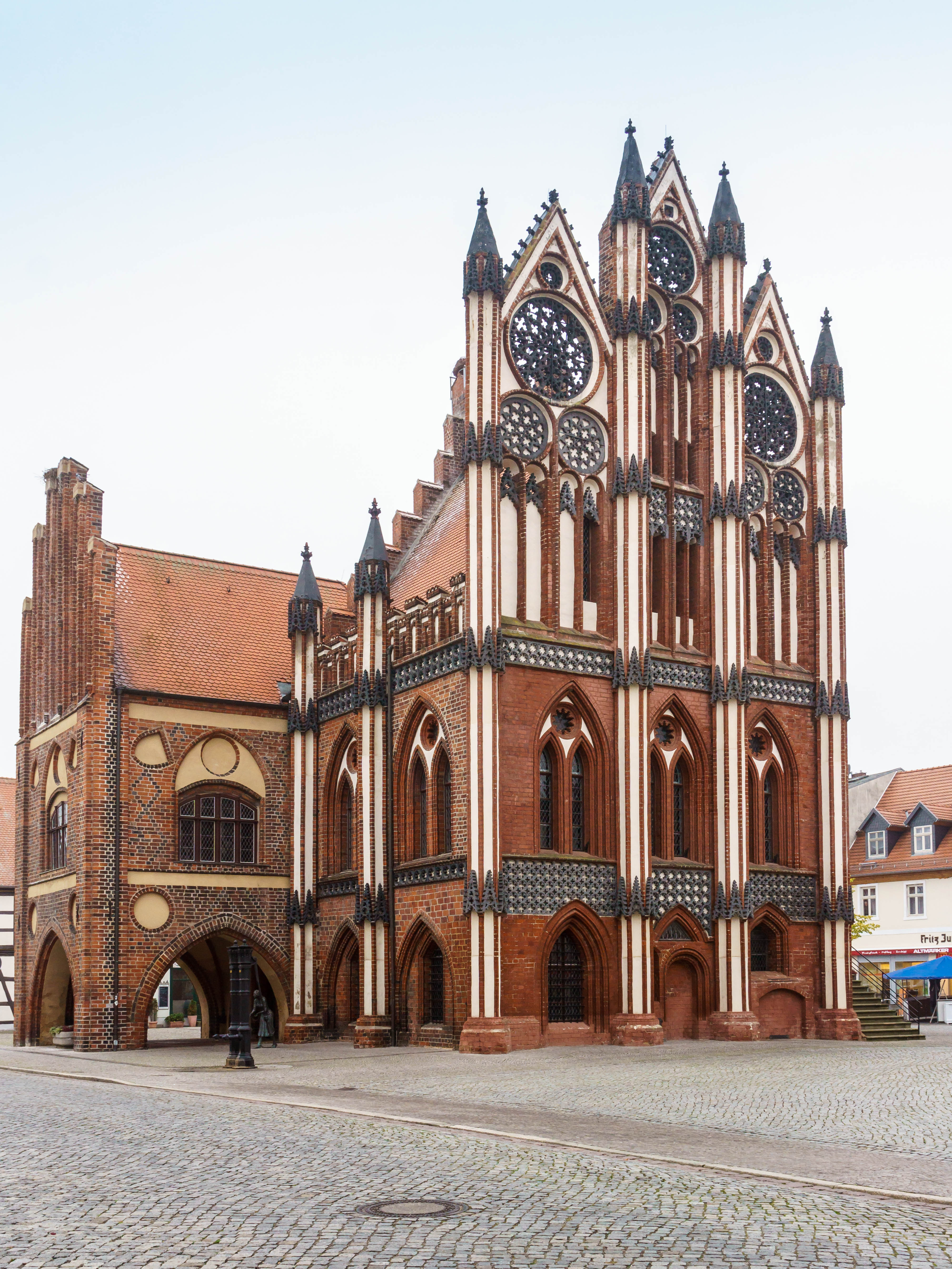 Altes Rathaus in Tangermünde